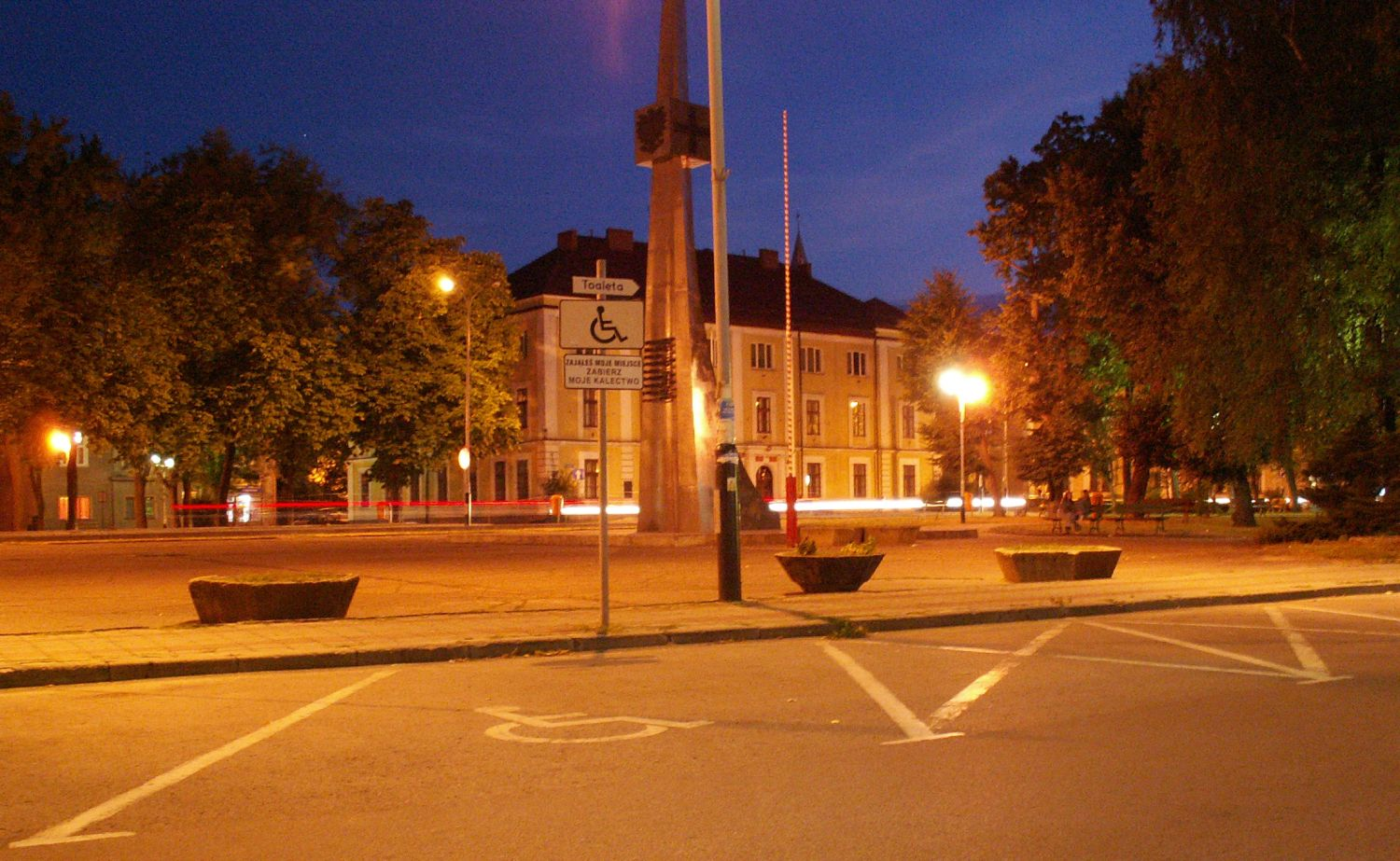 Nisko nocą - Plac Wolności